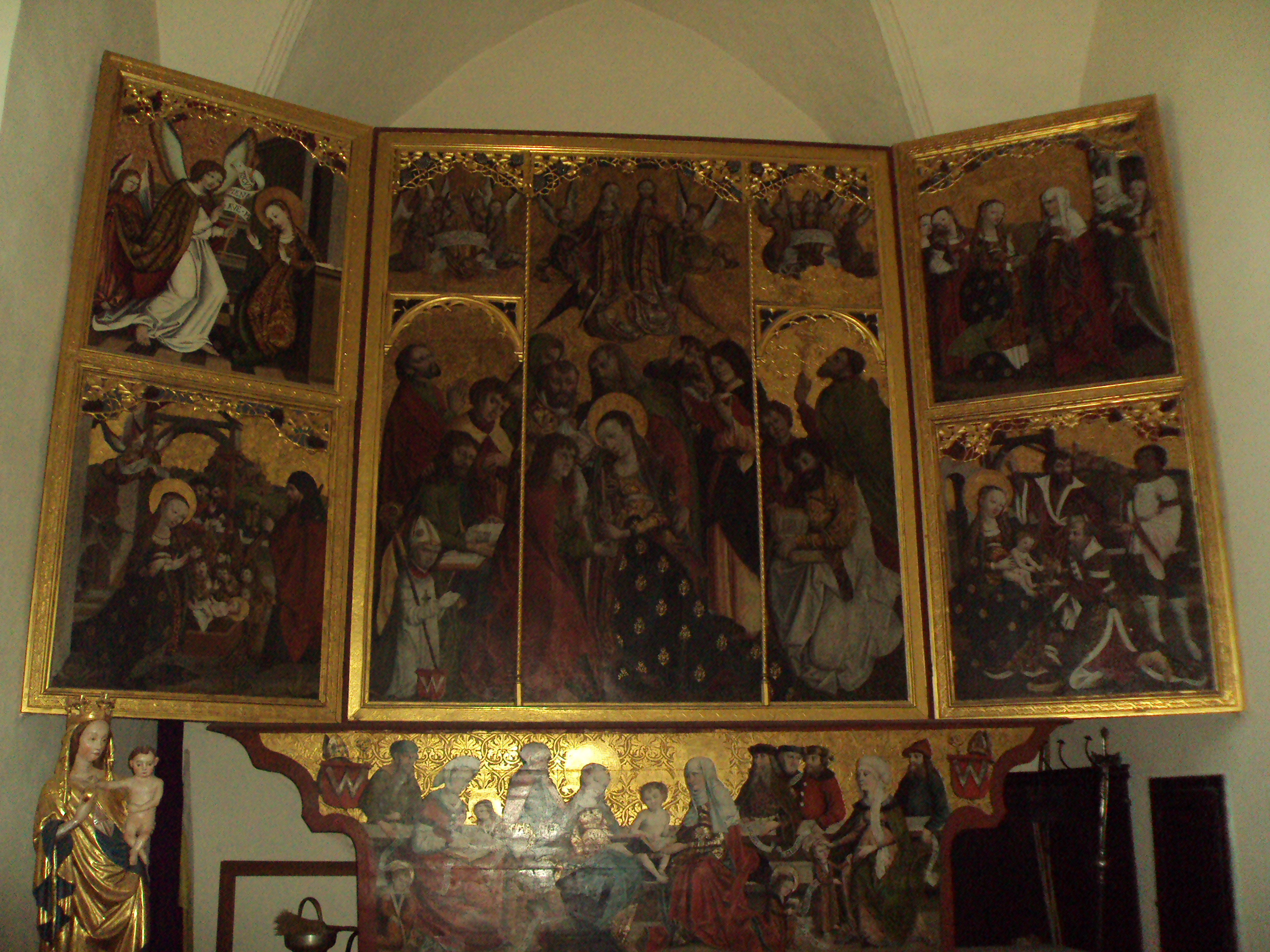 Bodzentyn kościół - tryptyk bodzentyński